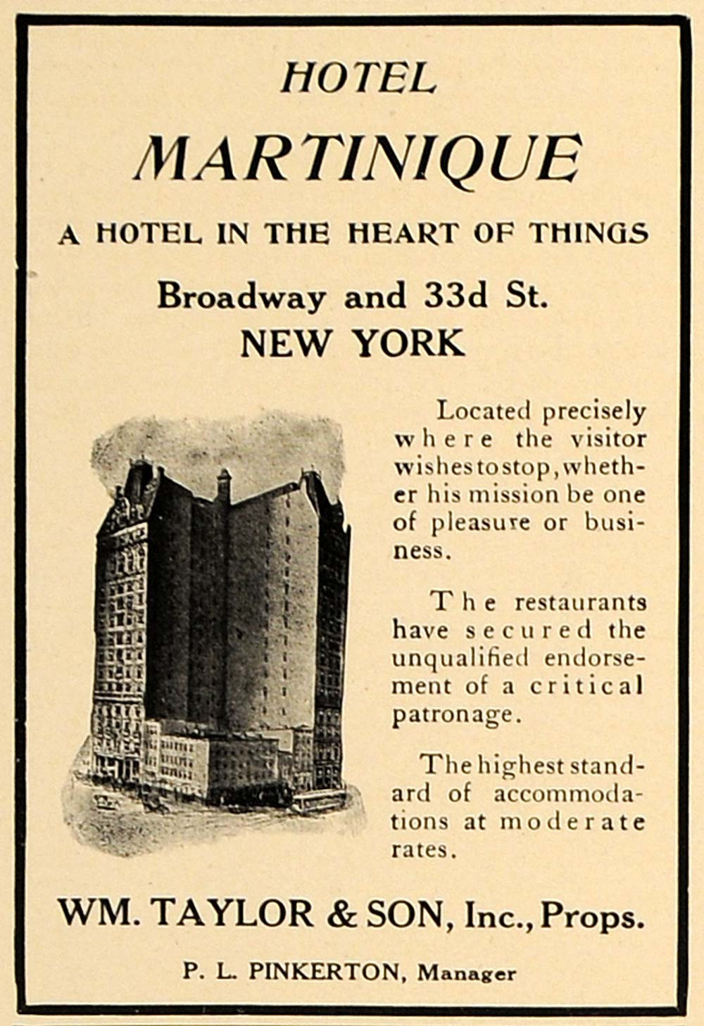 Anuncio publicitario de la agencia WM.Taylor & Son